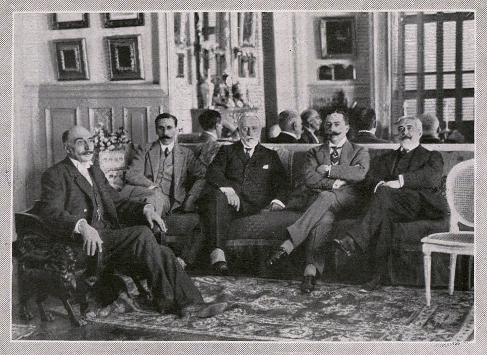 Fotografía tomada en uno de los salones de la Villa Arbelaiz (San Juan de Luz), propiedad de Tirso de Olazábal. De izquierda a derecha: Joaquín Llorens y Fernández de Córdoba, marqués de Córdoba; Tirso de Olazábal y Álvarez de Eulate; Tirso de Olazábal y Lardizábal, conde de Arbelaiz; Jaime III de Borbón, duque de Madrid; y Francisco de Melgar, conde de Melgar del Rey.